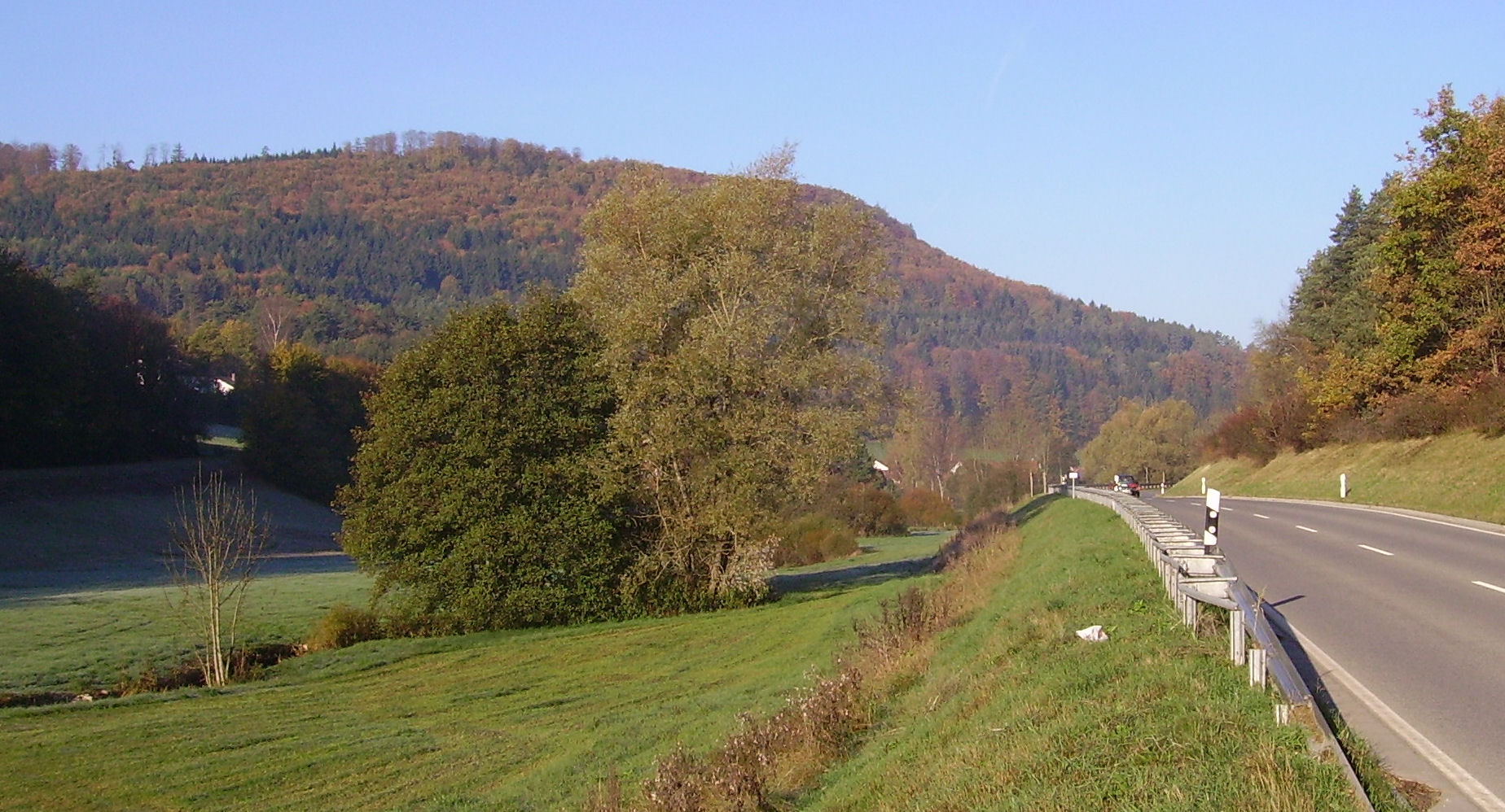 view of Zoggendorf, part of Heiligenstadt in Oberfranken in northern Bavaria, Germany